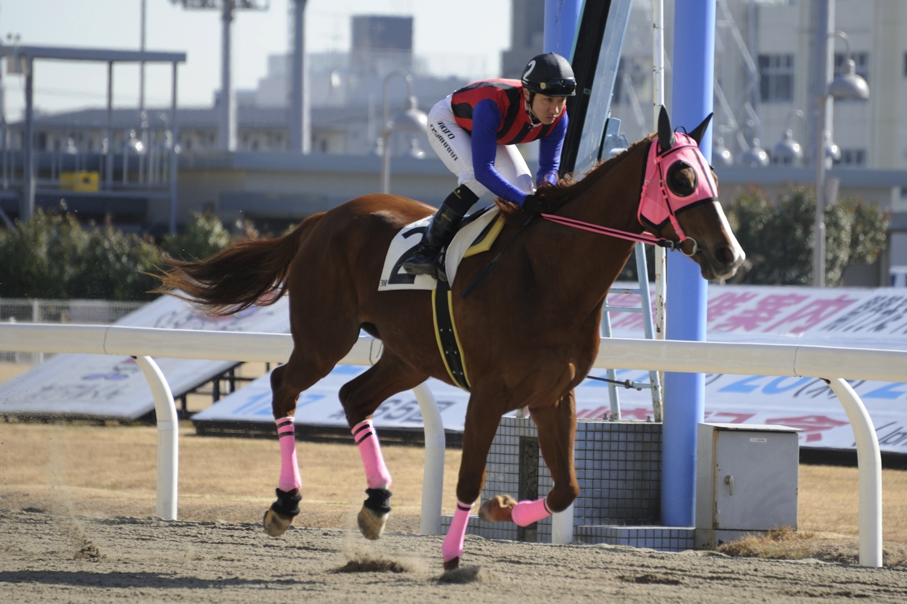 2016年1月27日、川崎競馬3Rでアミフジテンショウ号に騎乗する吉原寛人騎手